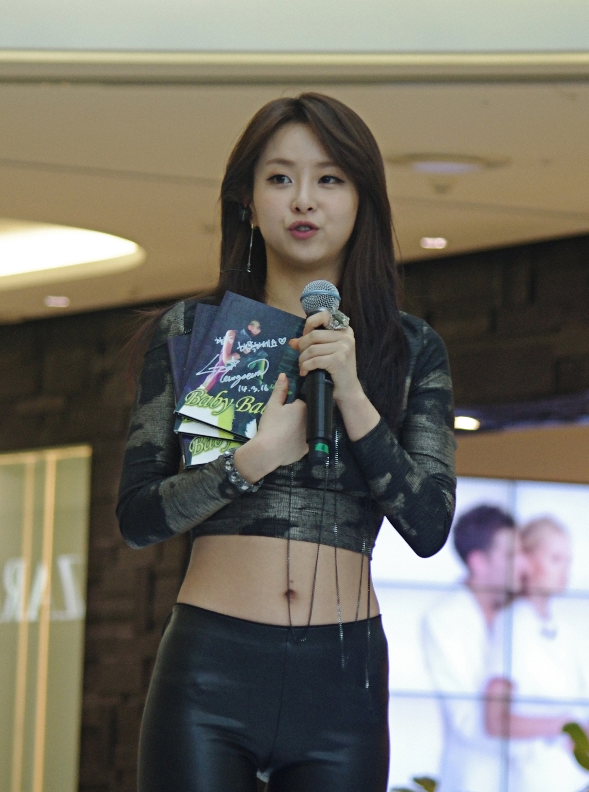 타임스퀘어 - 은가은 - babybaby ( 베이비 베이비 )